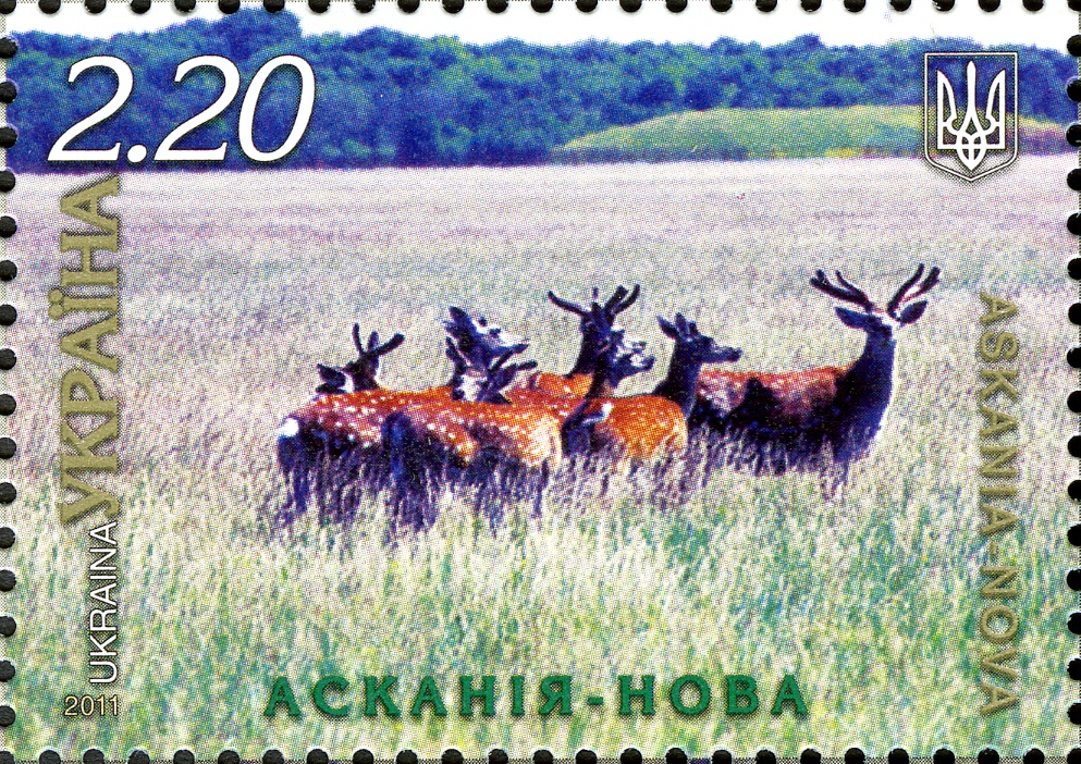 Асканія-Нова на марці, присвяченій проекту "Сім природніх чудес України"